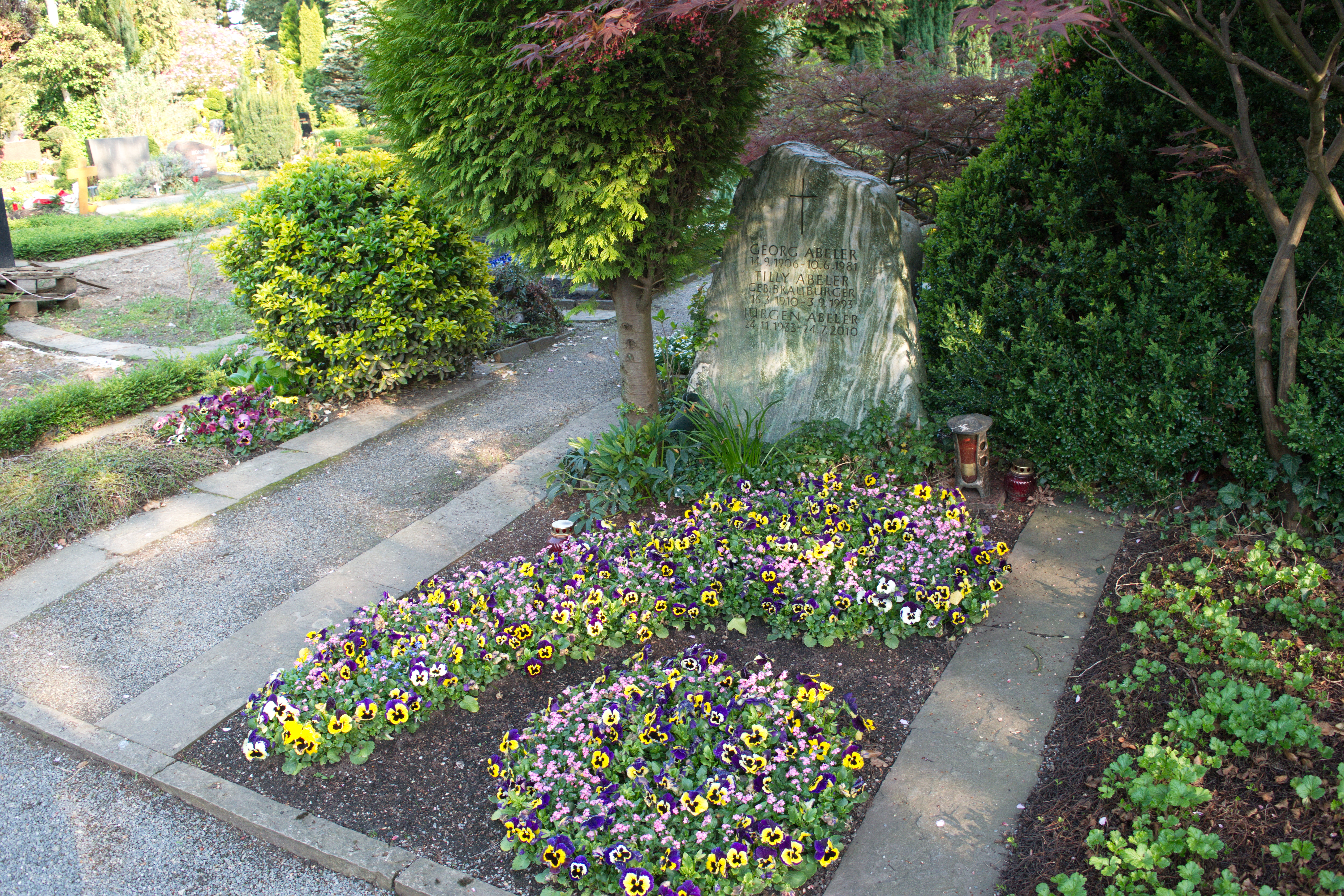 Hochstraße, Wuppertal